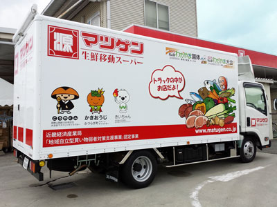 松源生鮮移動スーパー